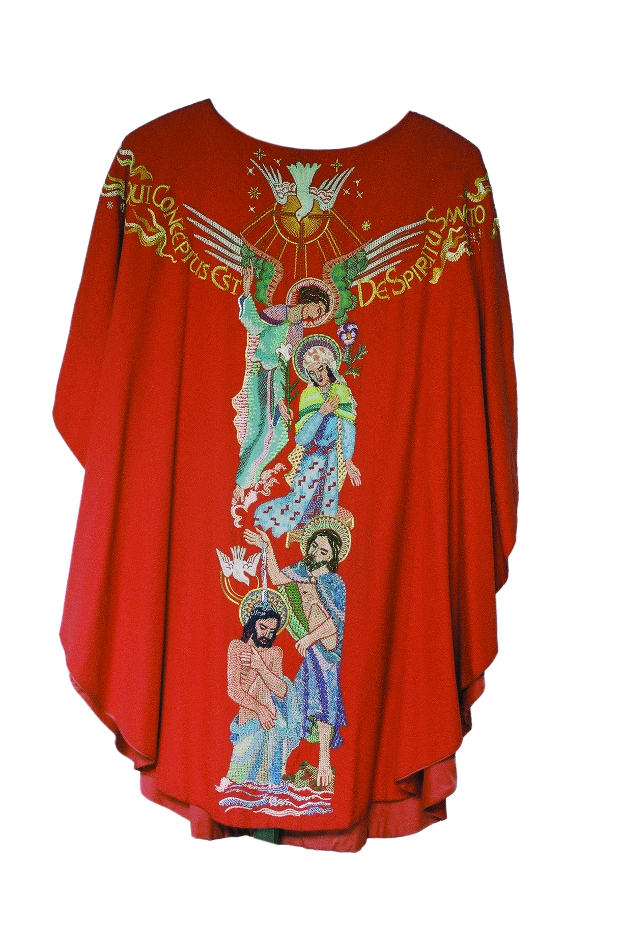 Kazuifel van het Hilversumse atelier J.L. Sträter, ca. 1950-1955.